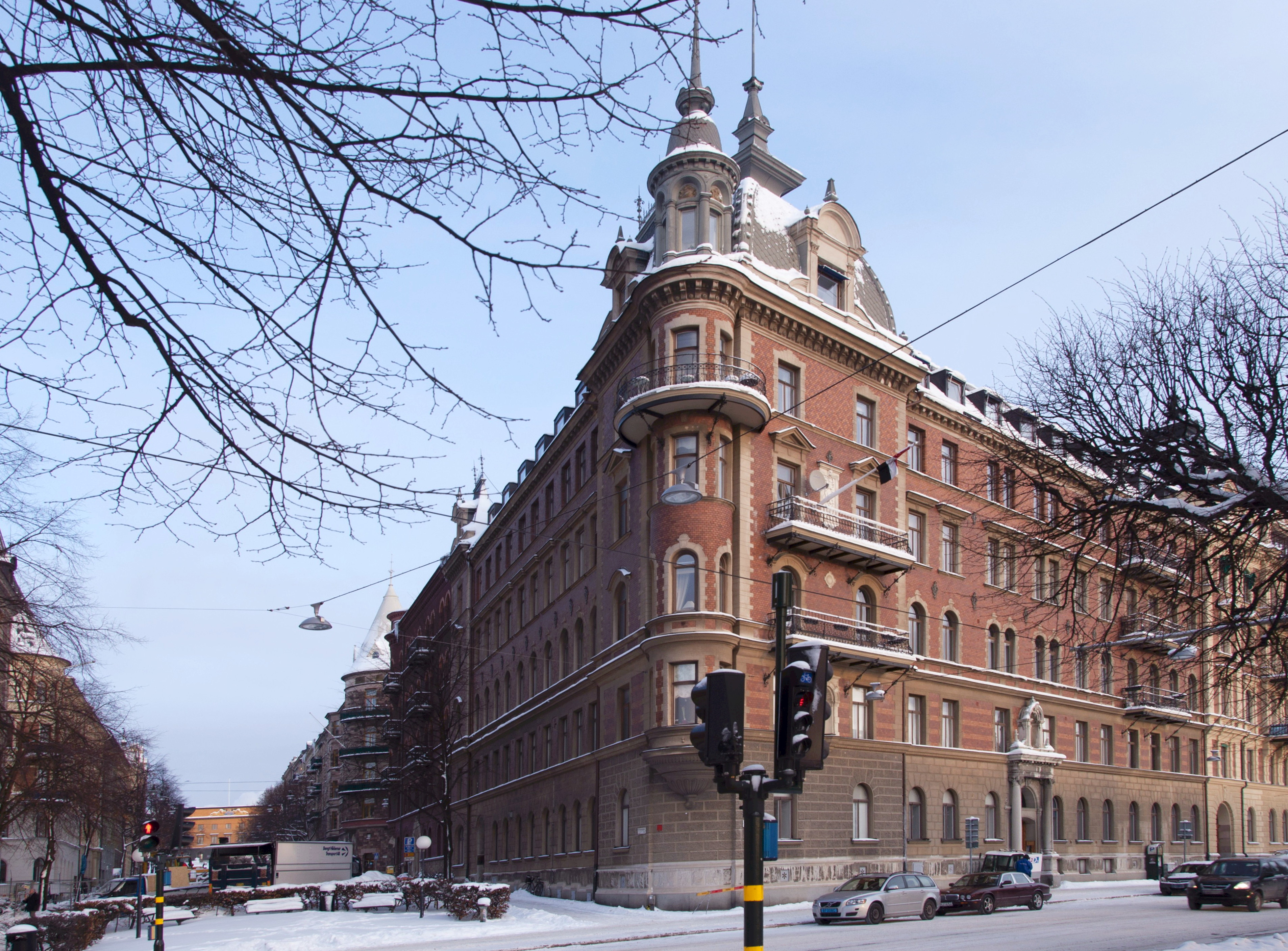 Strandvägen 35: Byggnadsår 1890-92, arkitekt Johan Laurentz, byggherre och byggmästare Sundahl & Brandel.